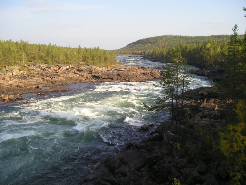 Bilden tagen från bron över älven oktober 2006. Foto: Curt Löfwenberg